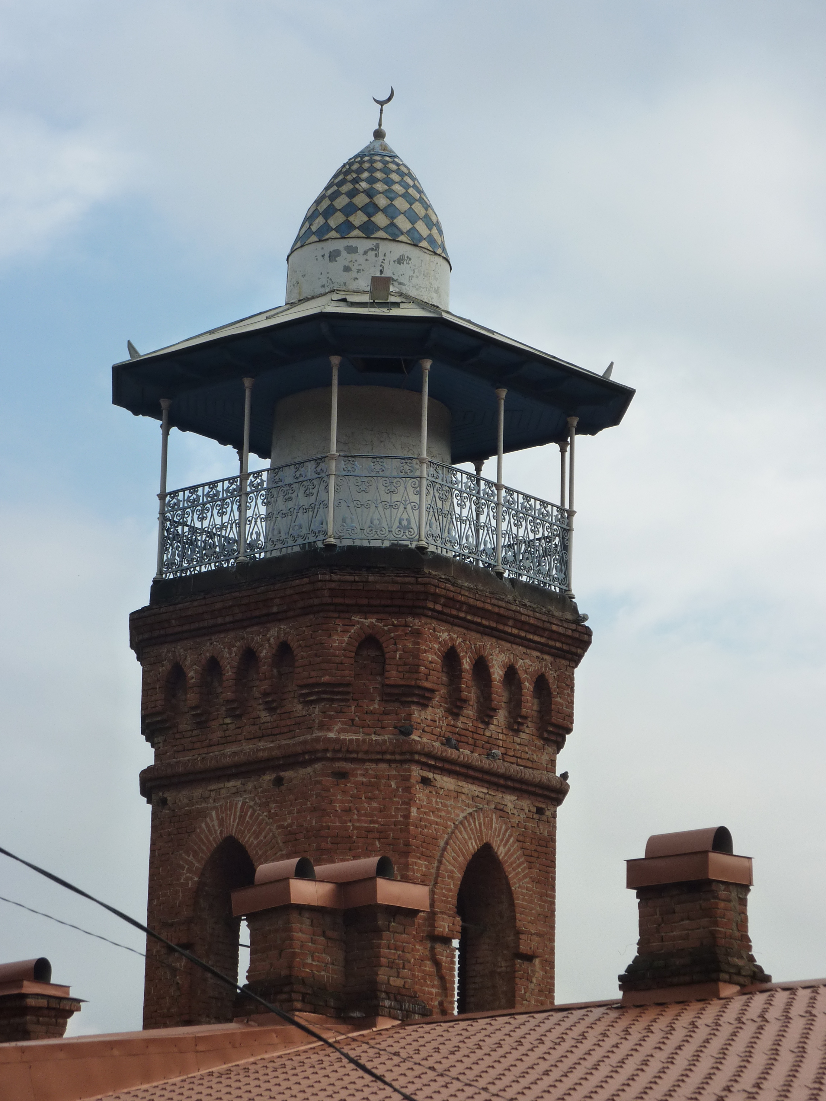 Tbliissi : la seule mosquée subsistante dans la ville